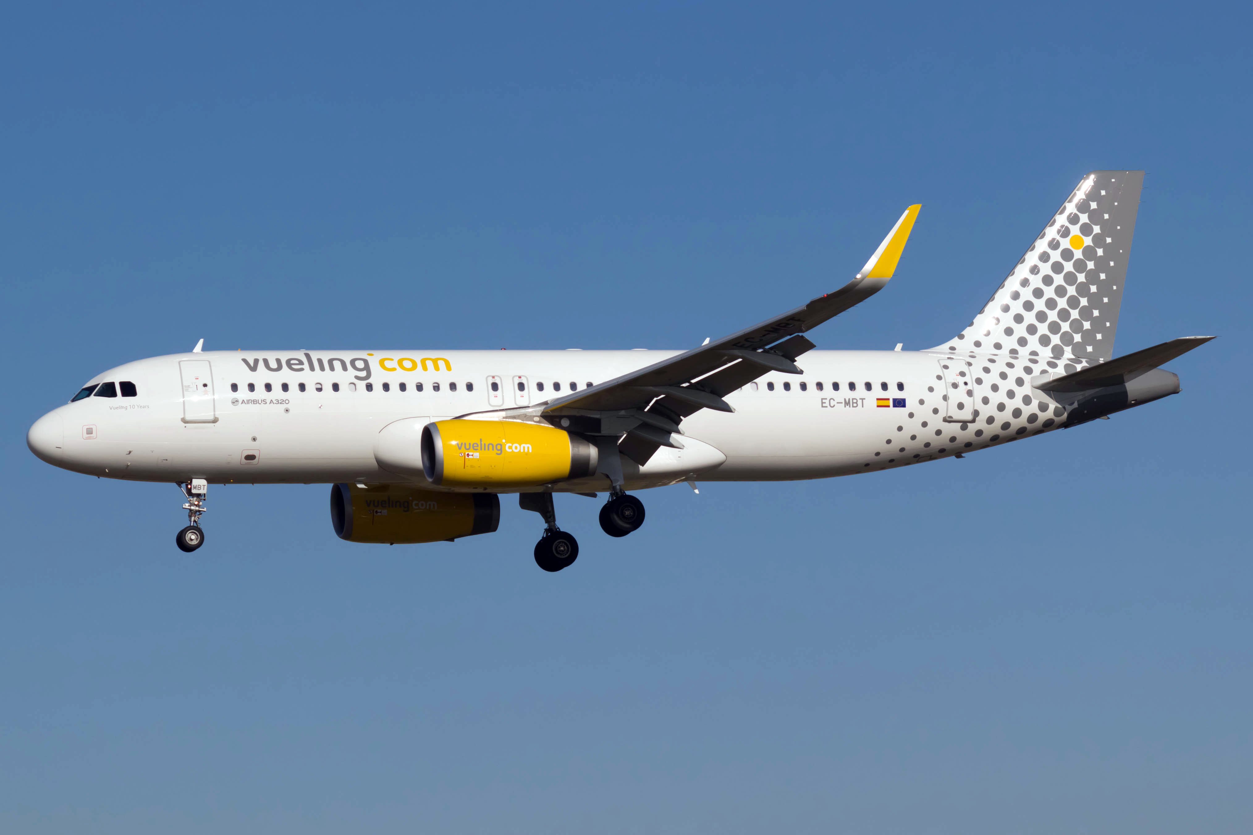 Airbus A320 de Vueling aterrando no aeroporto de Barcelona.